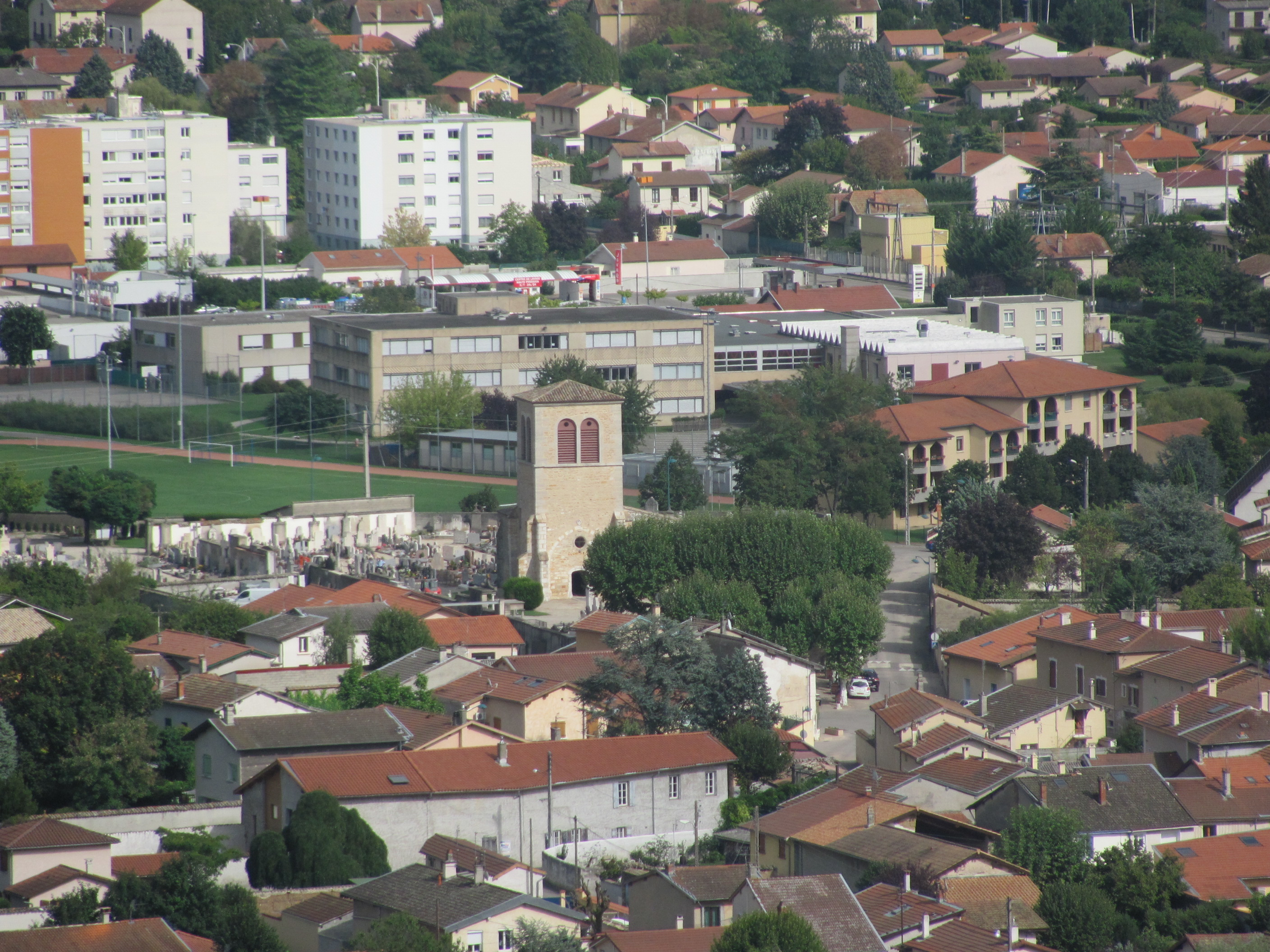 Vue générale du quartier de Saint-Martin de Miribel et de son église entourée du cimetière (depuis l'esplanade de la Madone).